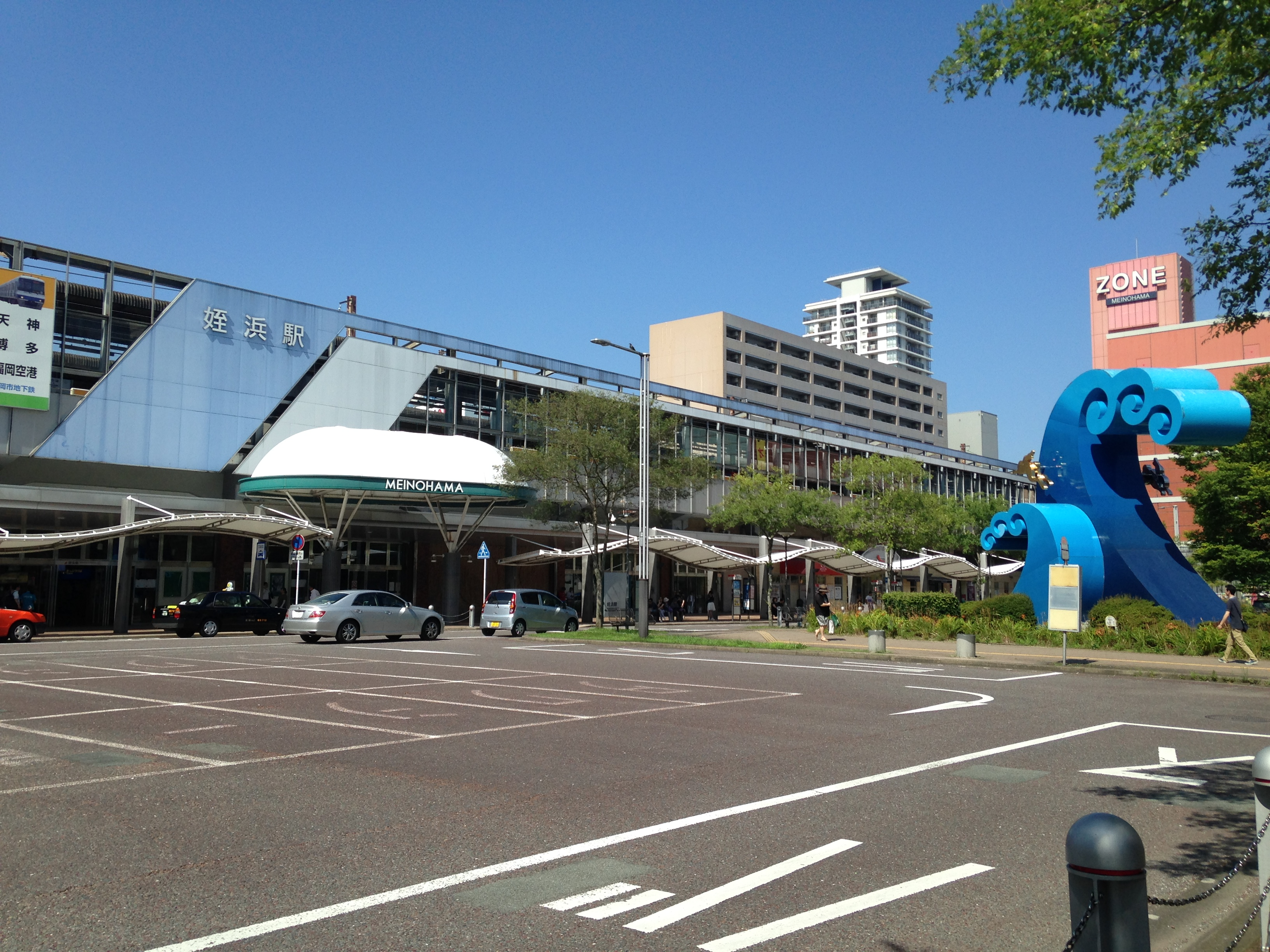 南西側より望む姪浜駅駅舎